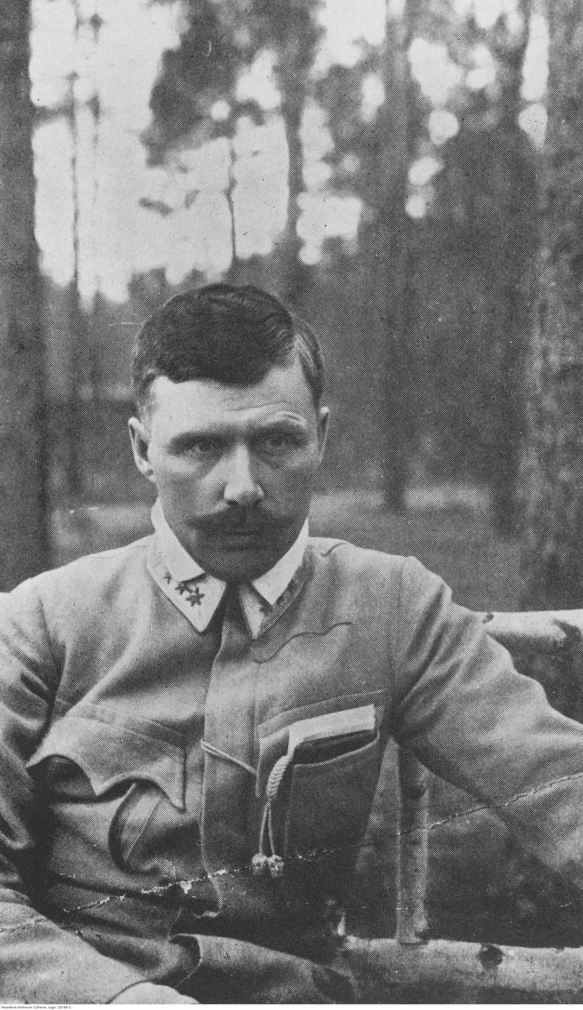 Bolesław Roja, pułkownik dowódca 4 pułku piechoty Legionów - fotografia sytuacyjna (siedzi na ławce).